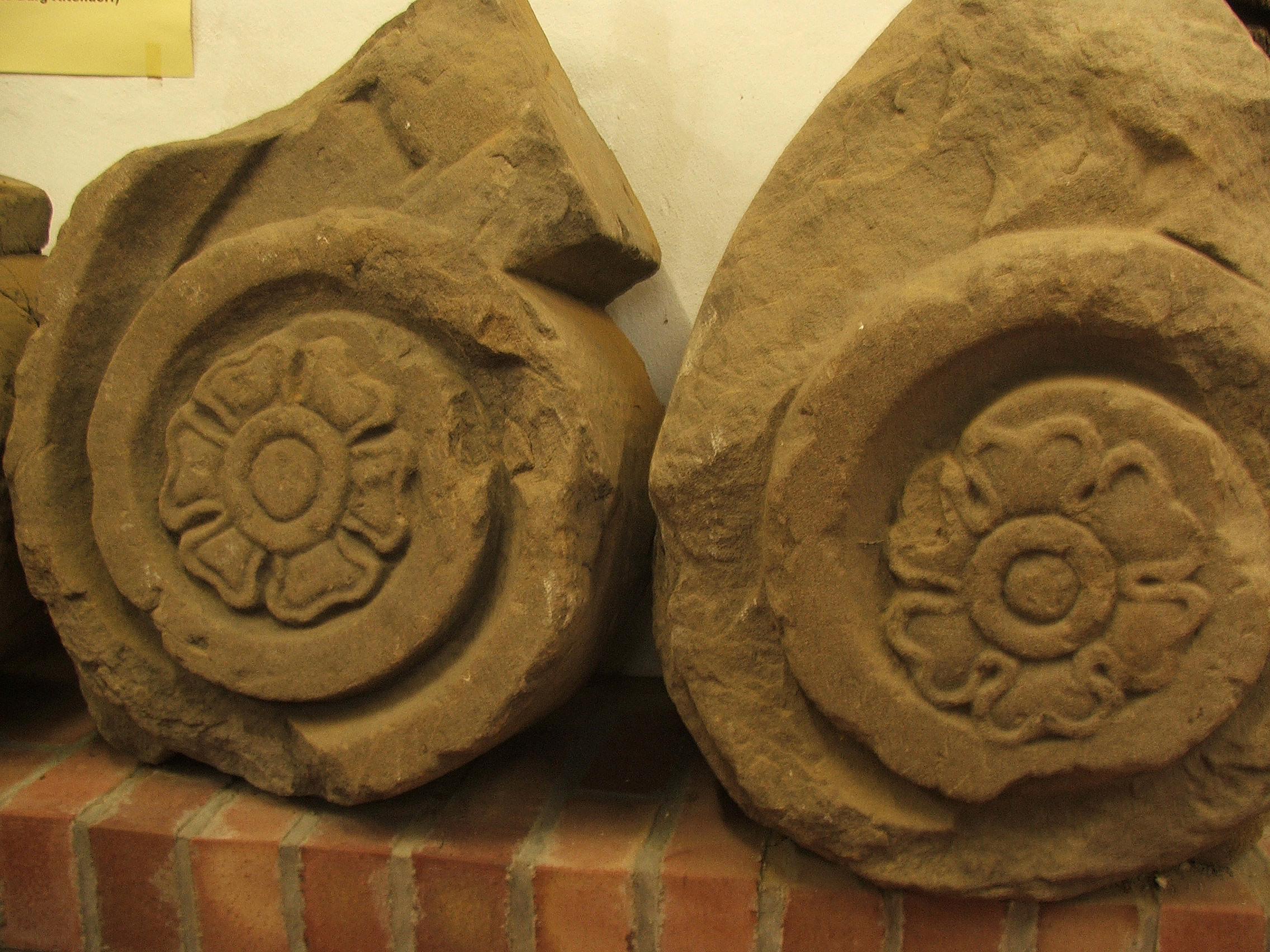 Isenburger Rose – Ziersteine von der Isenburg bei Hattingen, im Bügeleisenhaus ausgestellt, Deutschland